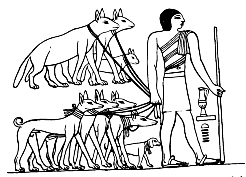 Tributzahlungen an den Pharao, unten rechts einzelner Vorläufer der Bracke, altägyptische Zeichnung